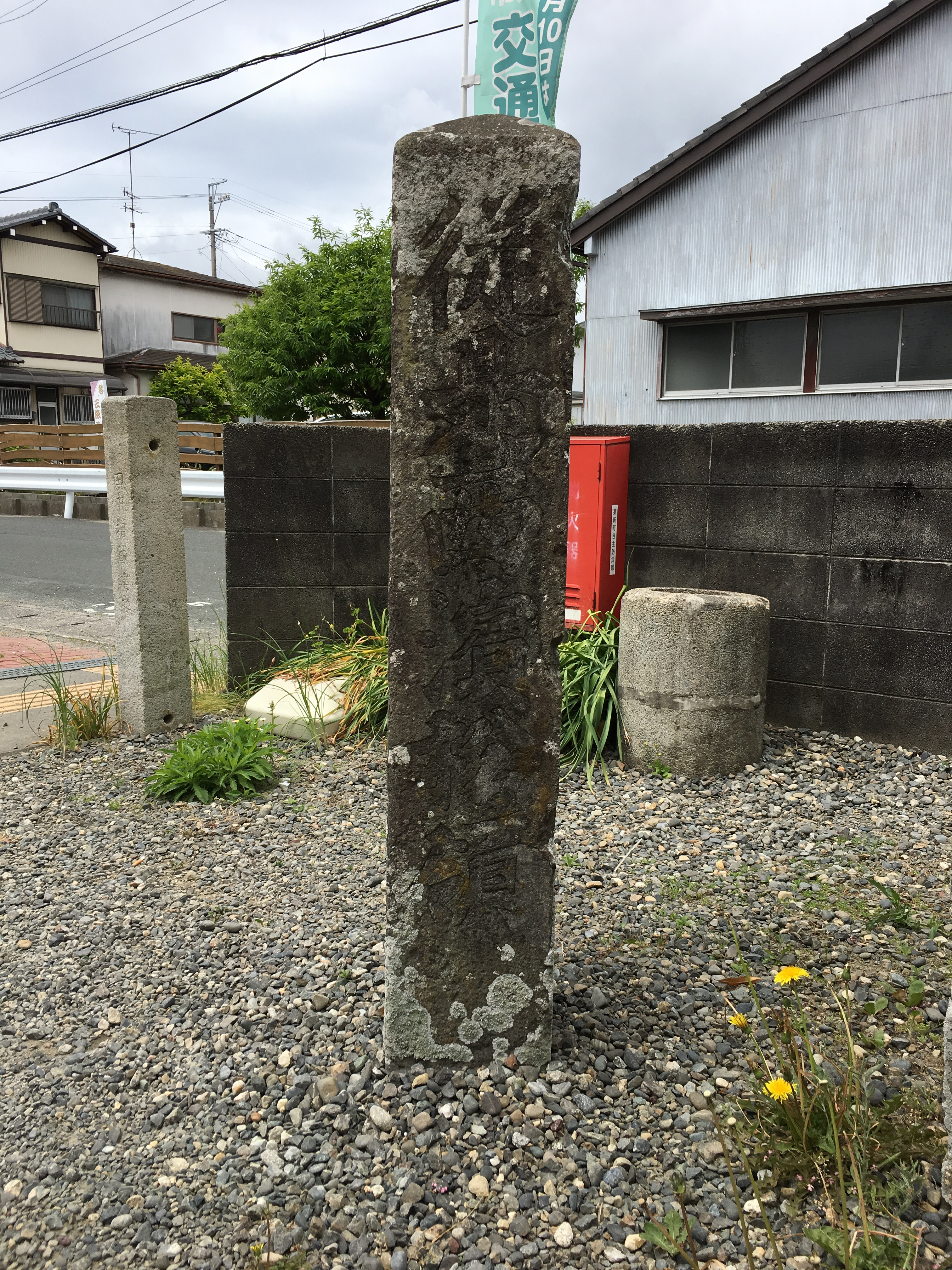 浜松藩の私領傍示杭（従是西浜松領）